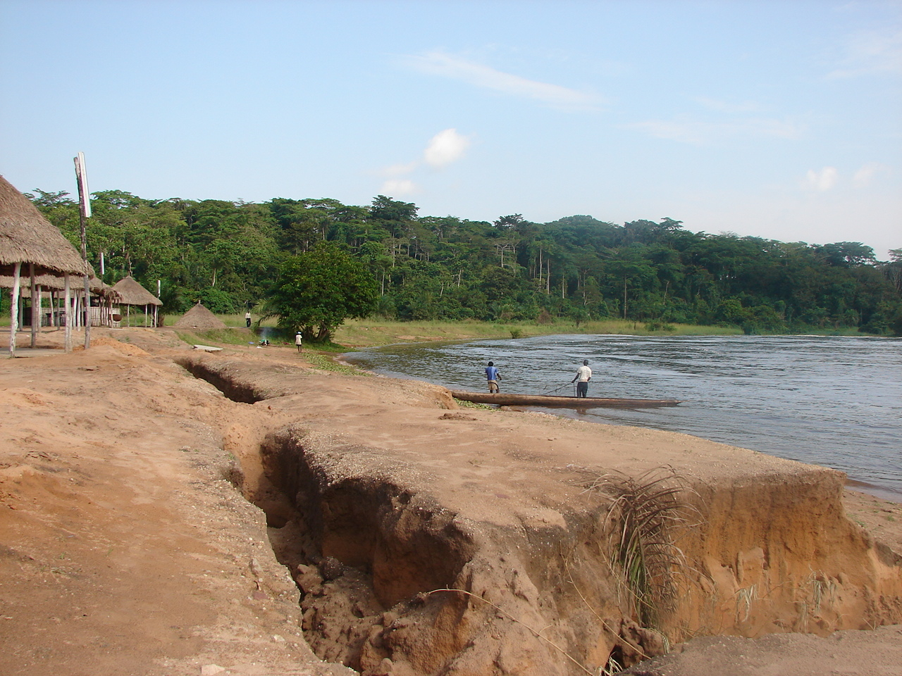 Plage_de_rivière_tshopo.JPG